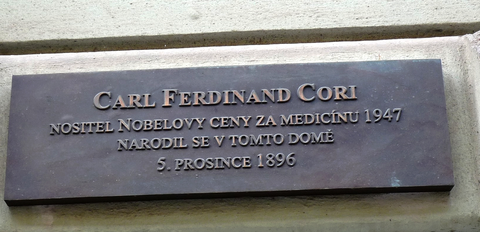 Pamětní deska Carl F.Cori (1896-1984) Praha Salmovská ulice